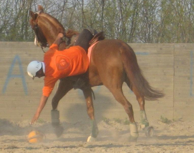 Un'immagine di ramassage. Foto scattata durante una sessione di allenamento alla "Scuderia La Bellaria"